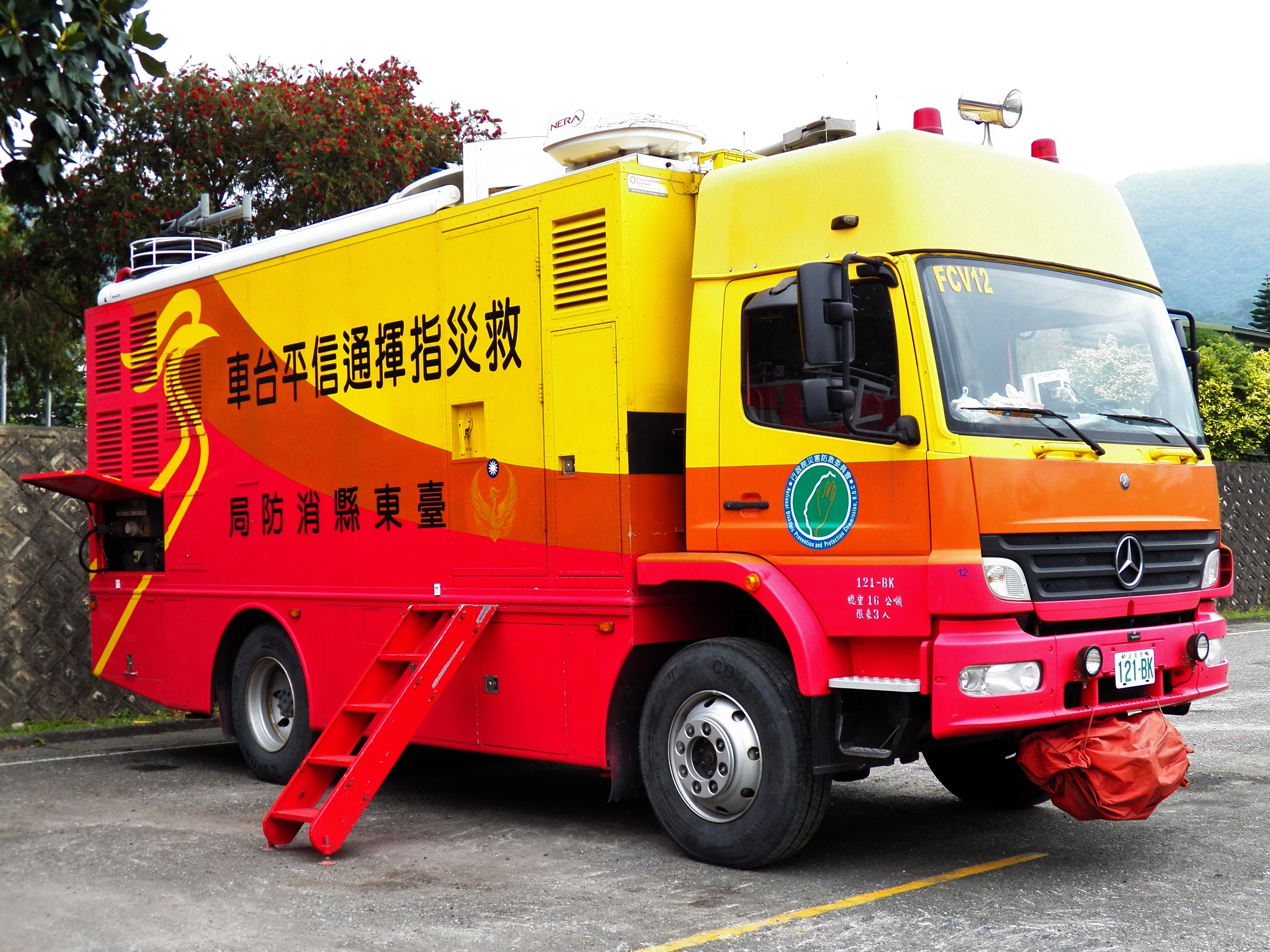 臺東縣消防局救災指揮通信平台車121-BK，駕駛座車門漆行政院災害防救委員會會徽。攝於2012年陸軍臺東地區指揮部營區開放活動。